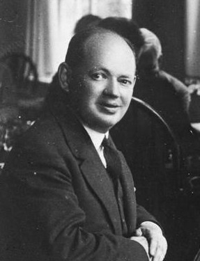 Рудольф Шпільман під час шахової партії проти М. Ейве